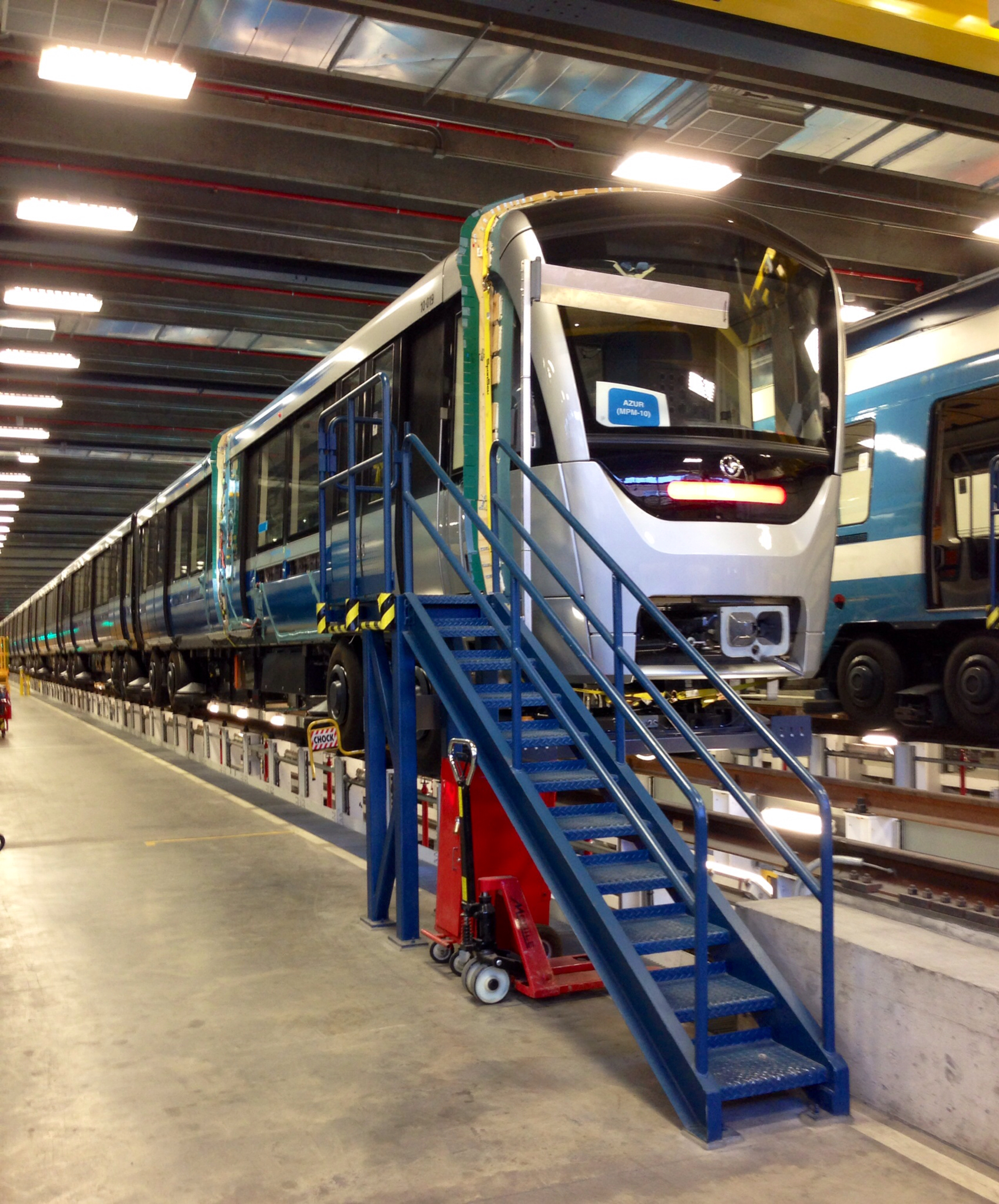 Métro Azur Montréal